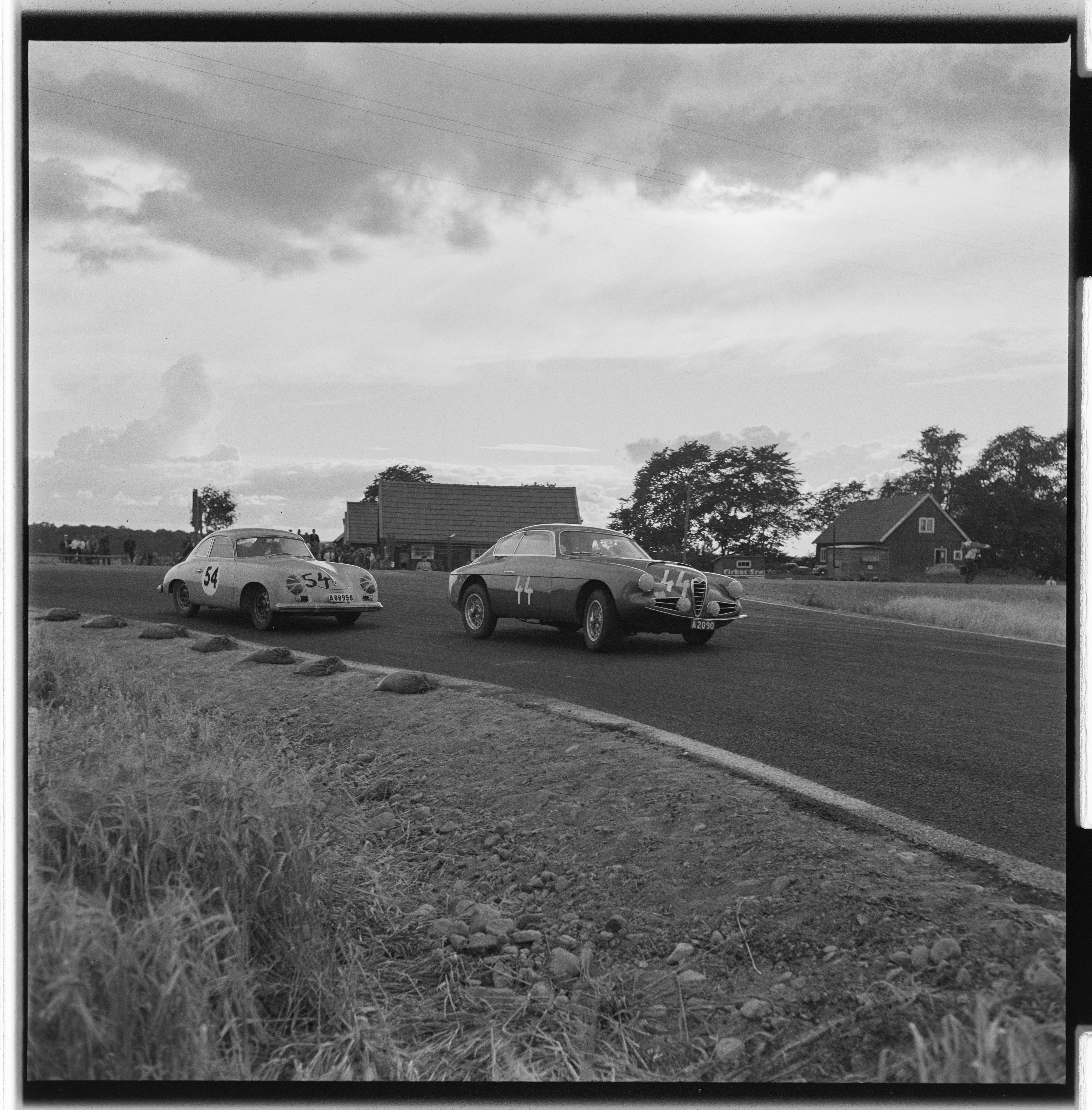 Bildet er hentet fra Arkivverket. Grand Prix i Kristianstad. NÅ nr. 33, 1955 Arkivinstitusjon : Riksarkivet Arkivnavn : Billedbladet NÅ Sted : Sverige, Skåne, Kristianstad, Råbelövsbanan Emneord: billøp, racing, motorsport Avbildet